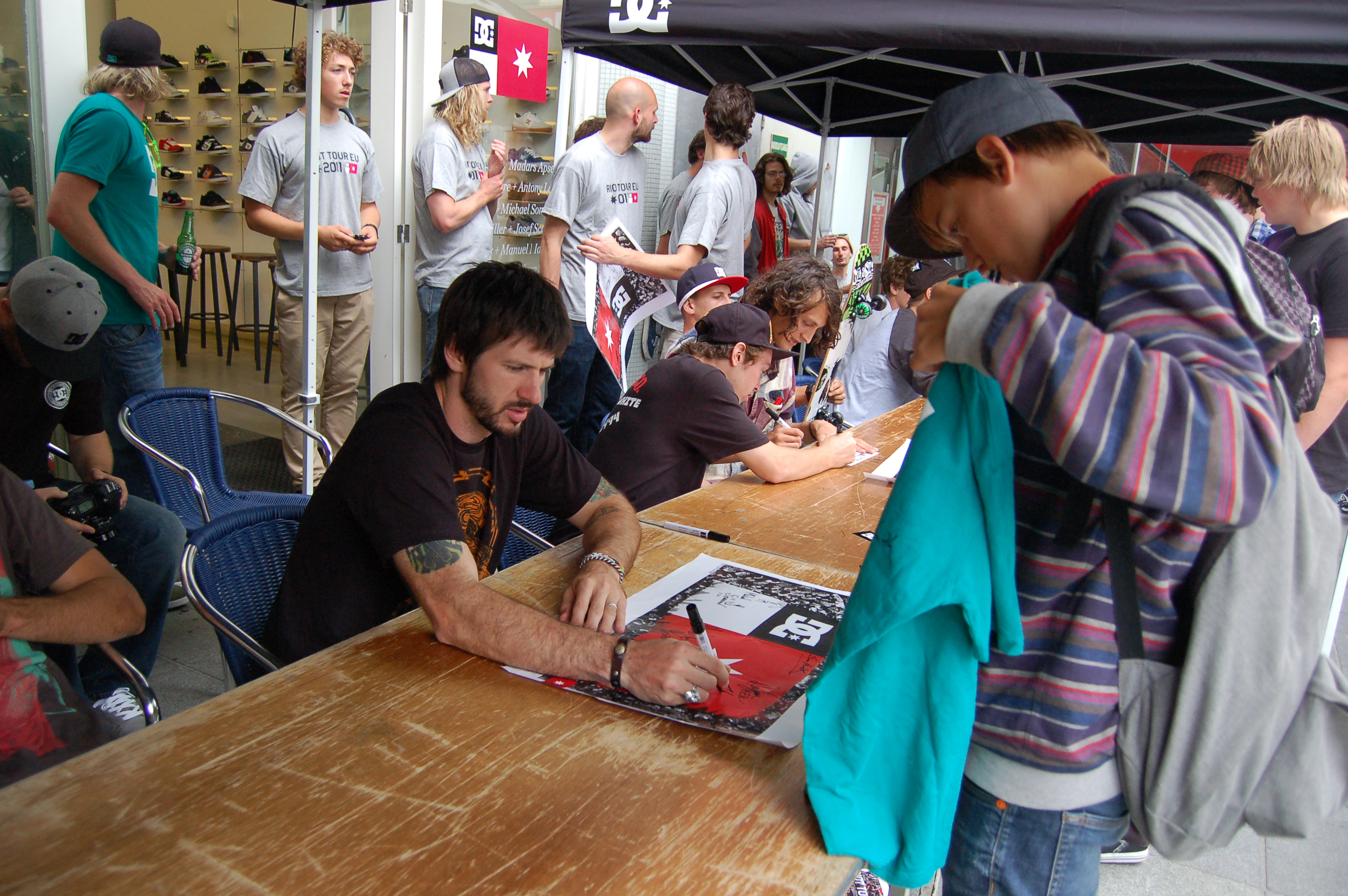 Chris Cole deelt tijdens een skate-evenement handtekeningen uit in Rotterdam.